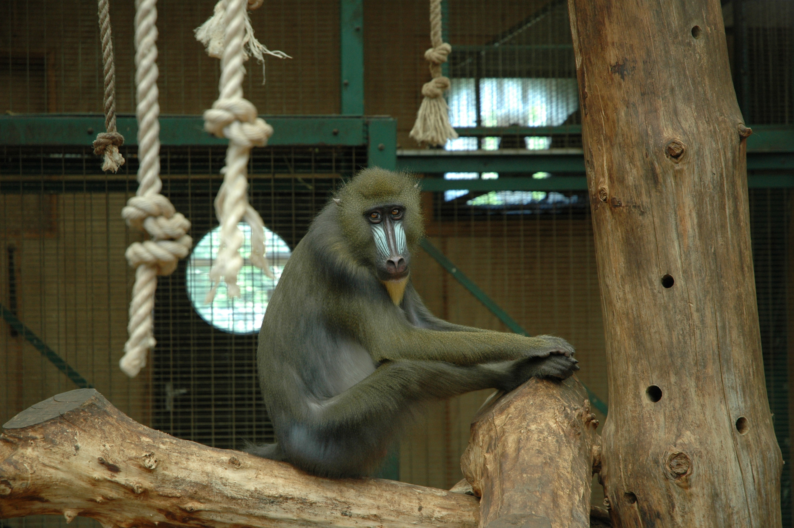 Mandril Monkeymandril